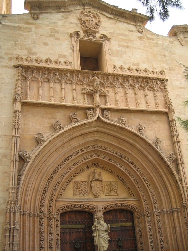 Església parroquial de Sant Jaume el Major, Oriola.